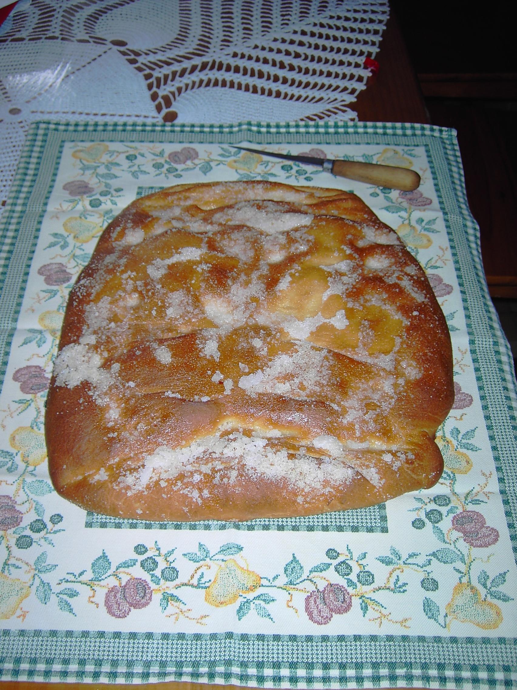 Una torta de Sobrarbe, producto típico de la repostería altoaragonesa, que se elabora amasando harina con huevo, agua, aceite vegetal y levadura, y espolvoreando generosamente azúcar sobre la masa recién salida del horno a fin de que parte de éste caramelice sobre el producto.